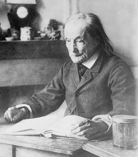 French entomolgist Jean-Henri Fabre (1823-1915)